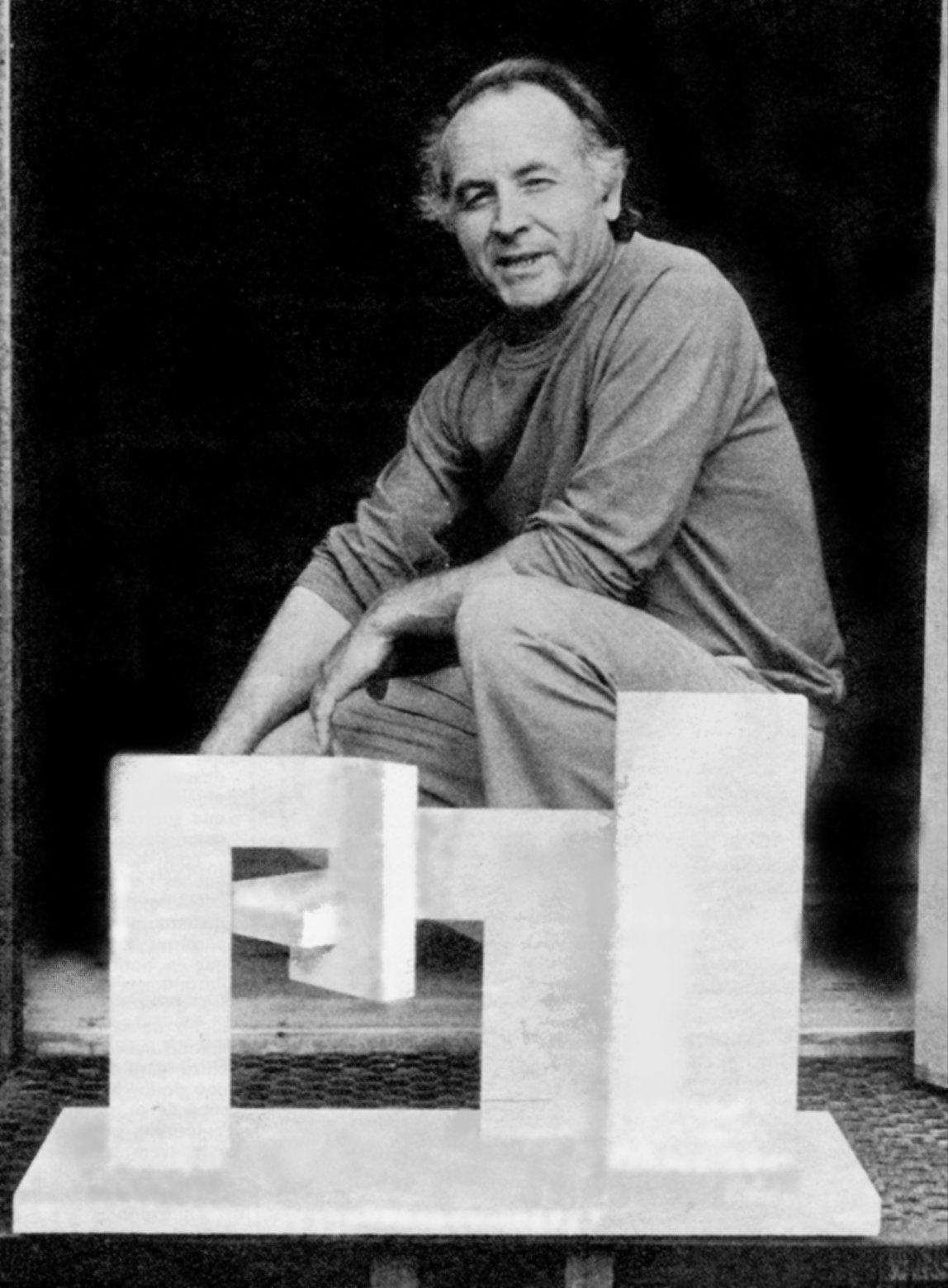 Foto en B/N del escultor español Ángel Mateos.